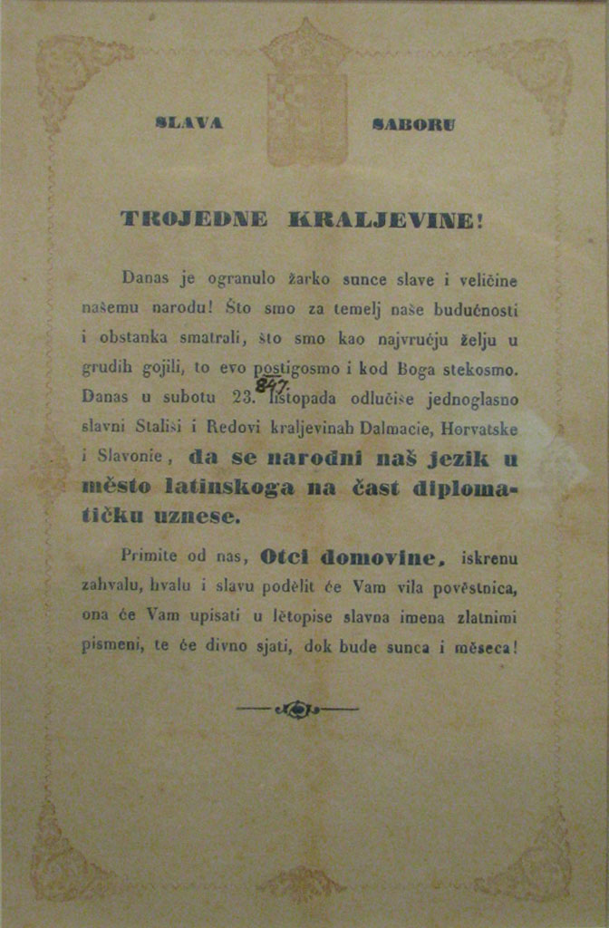 Letak Slava saboru Trojedne Kraljevine